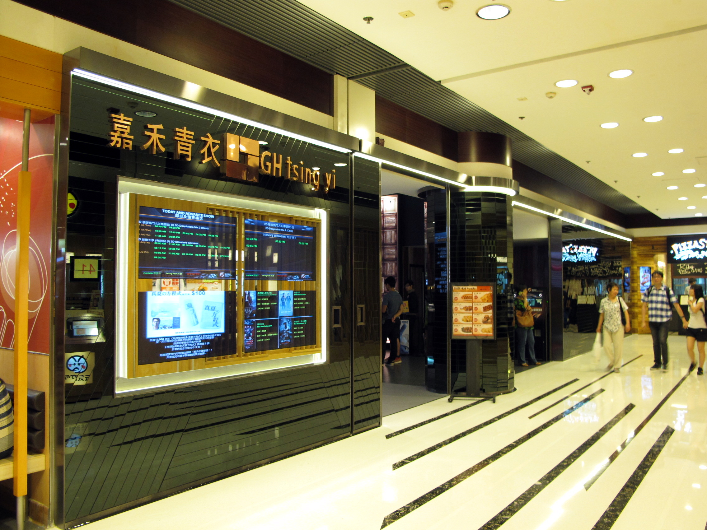 Golden Harvest Tsing Yi